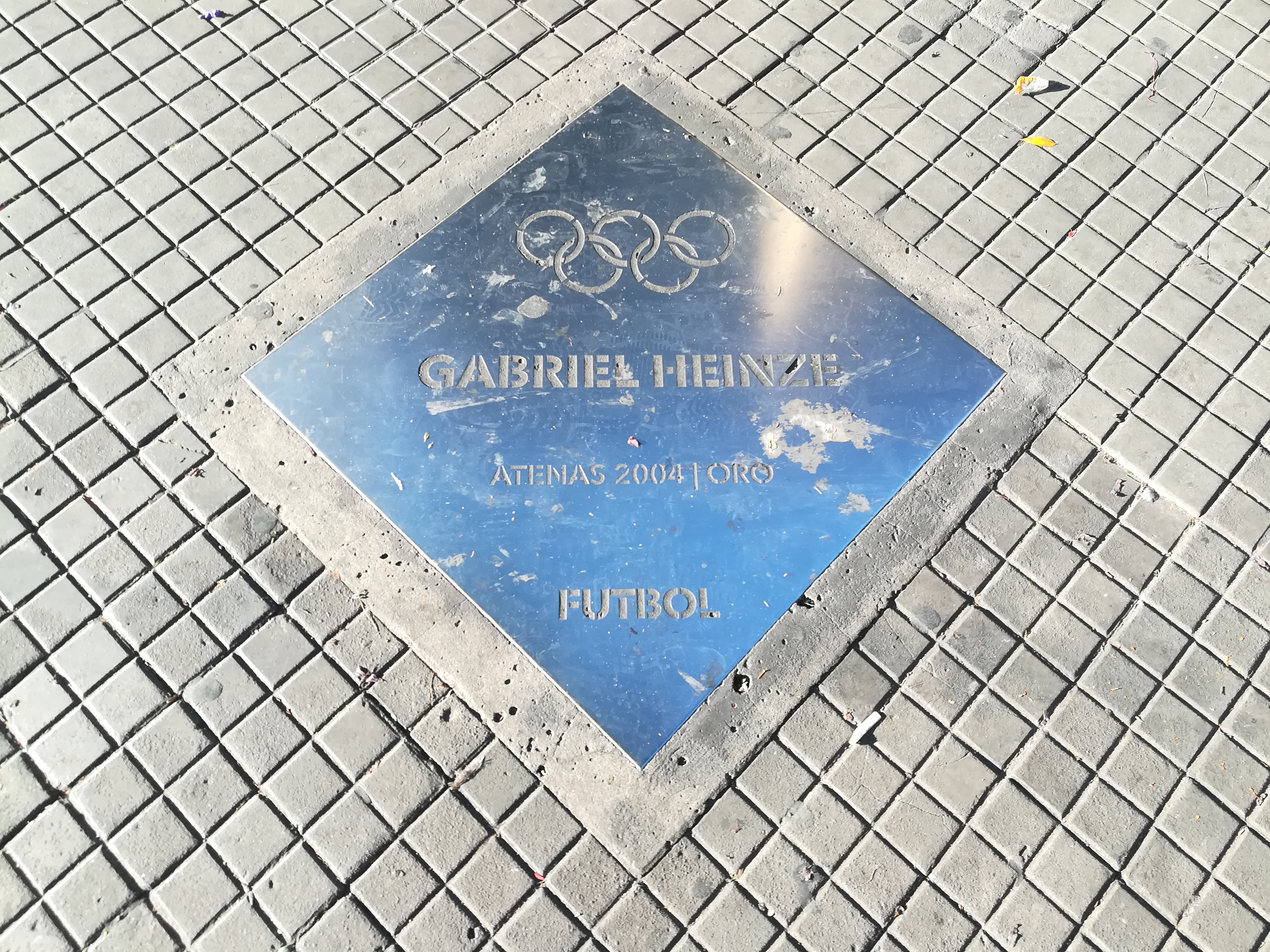 Paseo de los Olímpicos de los en la Avenida Pellegrini (Rosario).